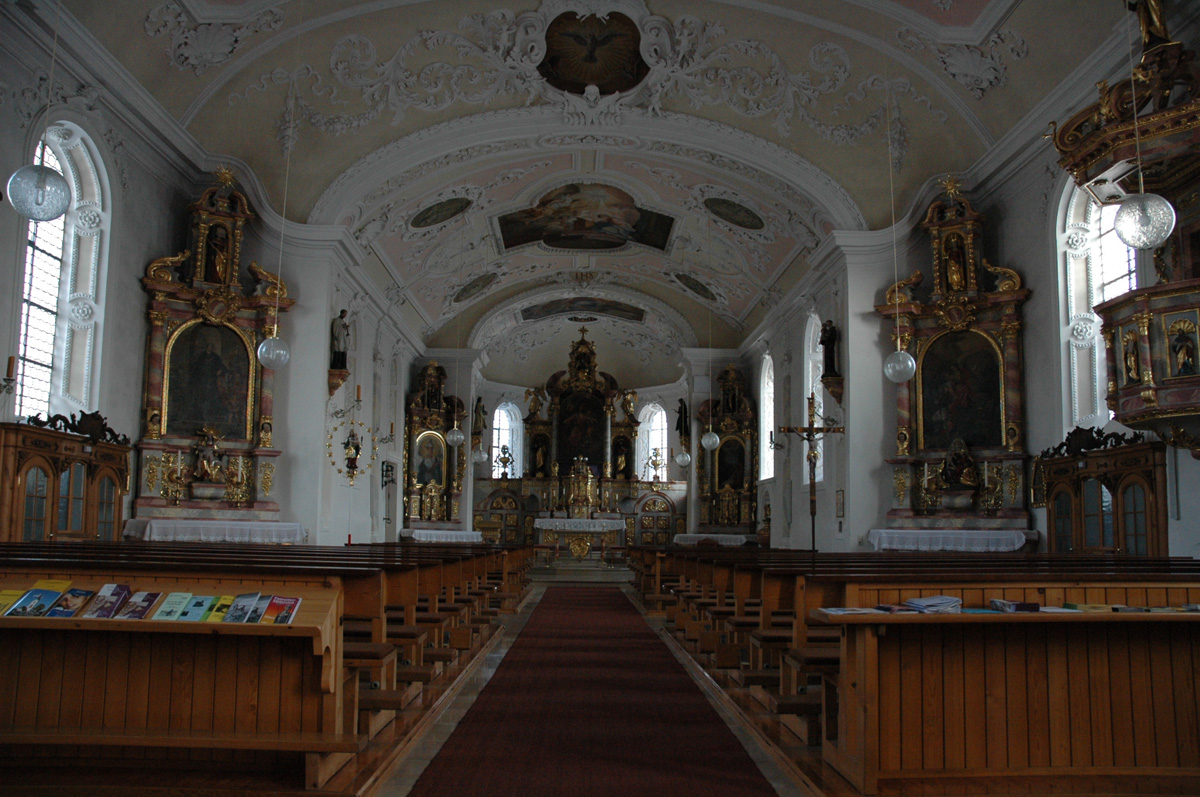 Kirche Hl. Geist, Durach, Allgaeu, Germany